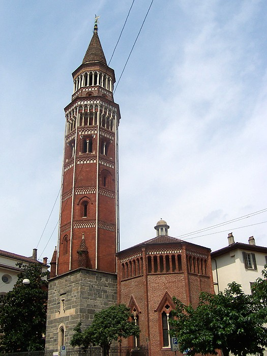 Milano - Campanile della Chiesa di S. Gottardo in Corte